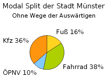 Modal Split der Stadt Münster ohne Wege der Auswärtigen. Die Zahlen beruhen auf